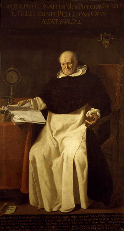 Retrato del fraile dominico Fray Jerónimo Mos.